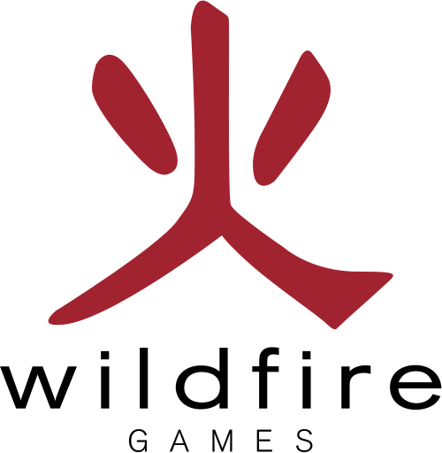 Logo von WildfireGames